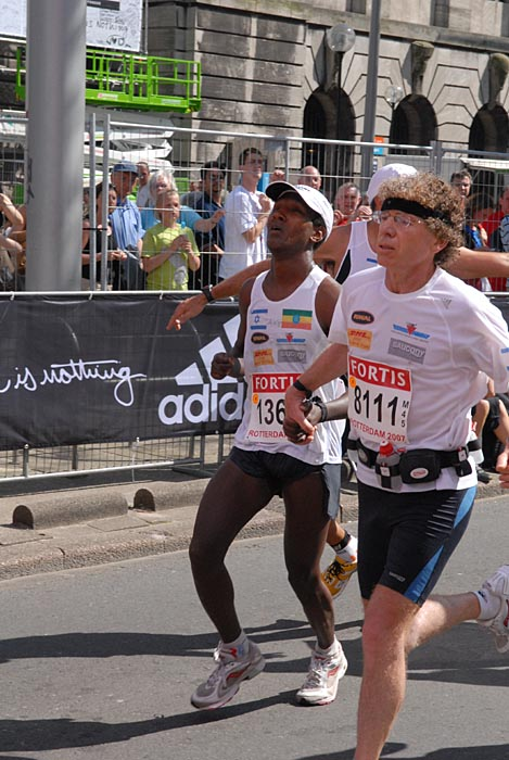 בזה נבבה במרתון רוטרדם